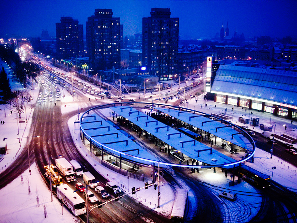 Plac Grunwaldzki we Wrocławiu w śniegu, wieczorem.